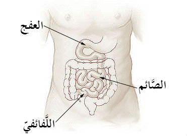 رسمُ بيانيّ تشريحيٌّ لِبعض أقسام الجهاز الهضمي عند الإنسان.